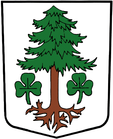 Wappen von Staldenried Kanton Wallis Schweiz